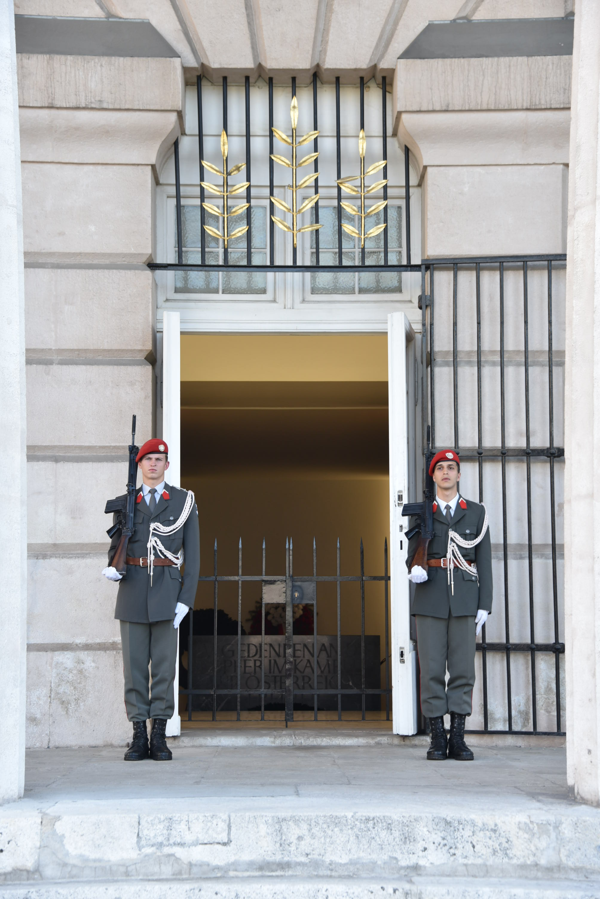 Mahnwache des Bundesheeres am 8. Mai 2016